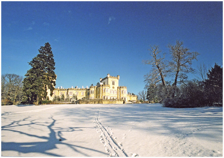 zámek Hrádek u Nechanic, district Hradec Králové autor: Prazak date: 1. 2004